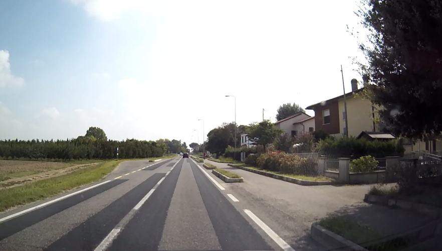 Russi, frazione case Turchetti